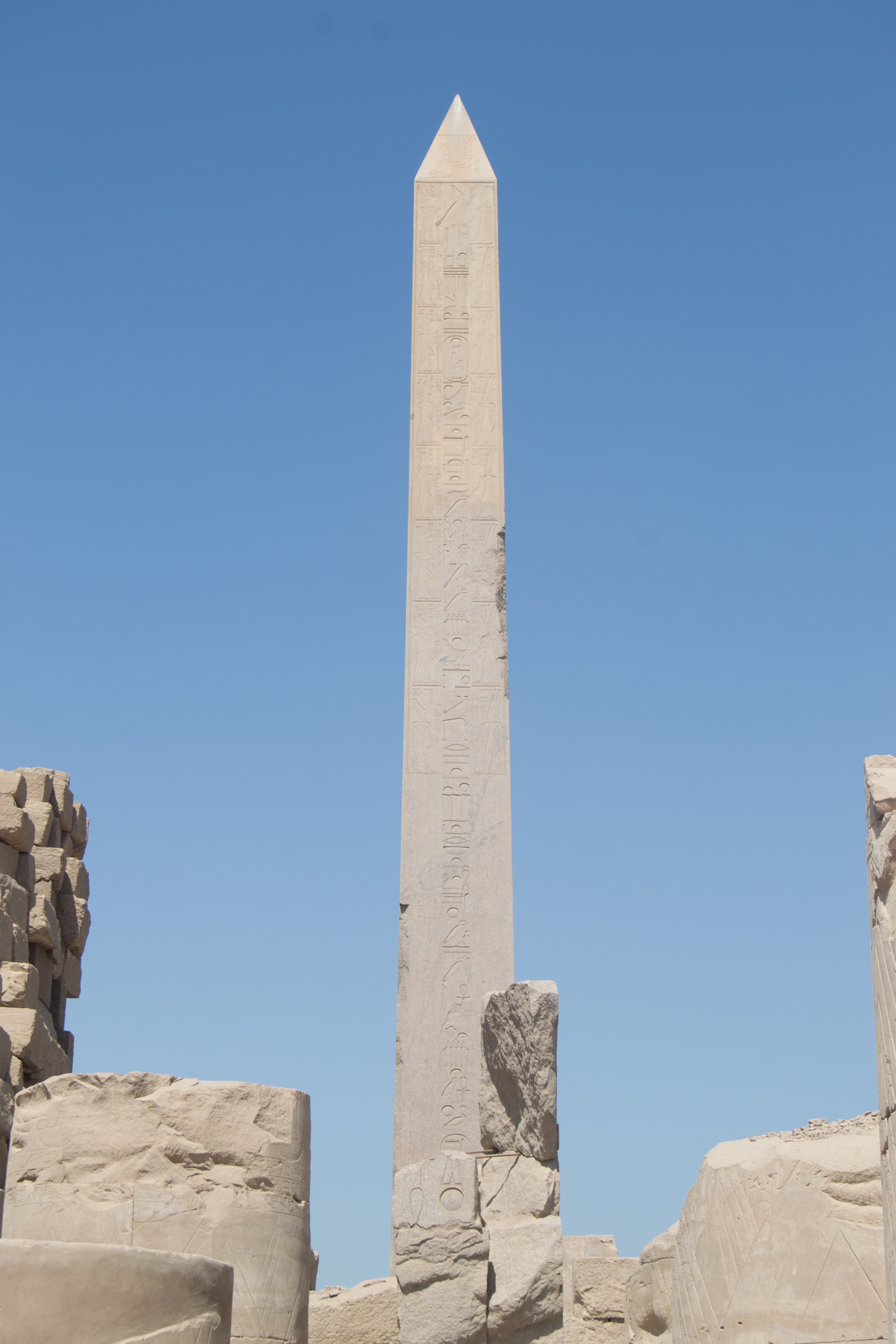 مصرى: مسلة - معبد الكرنك - الاقصر